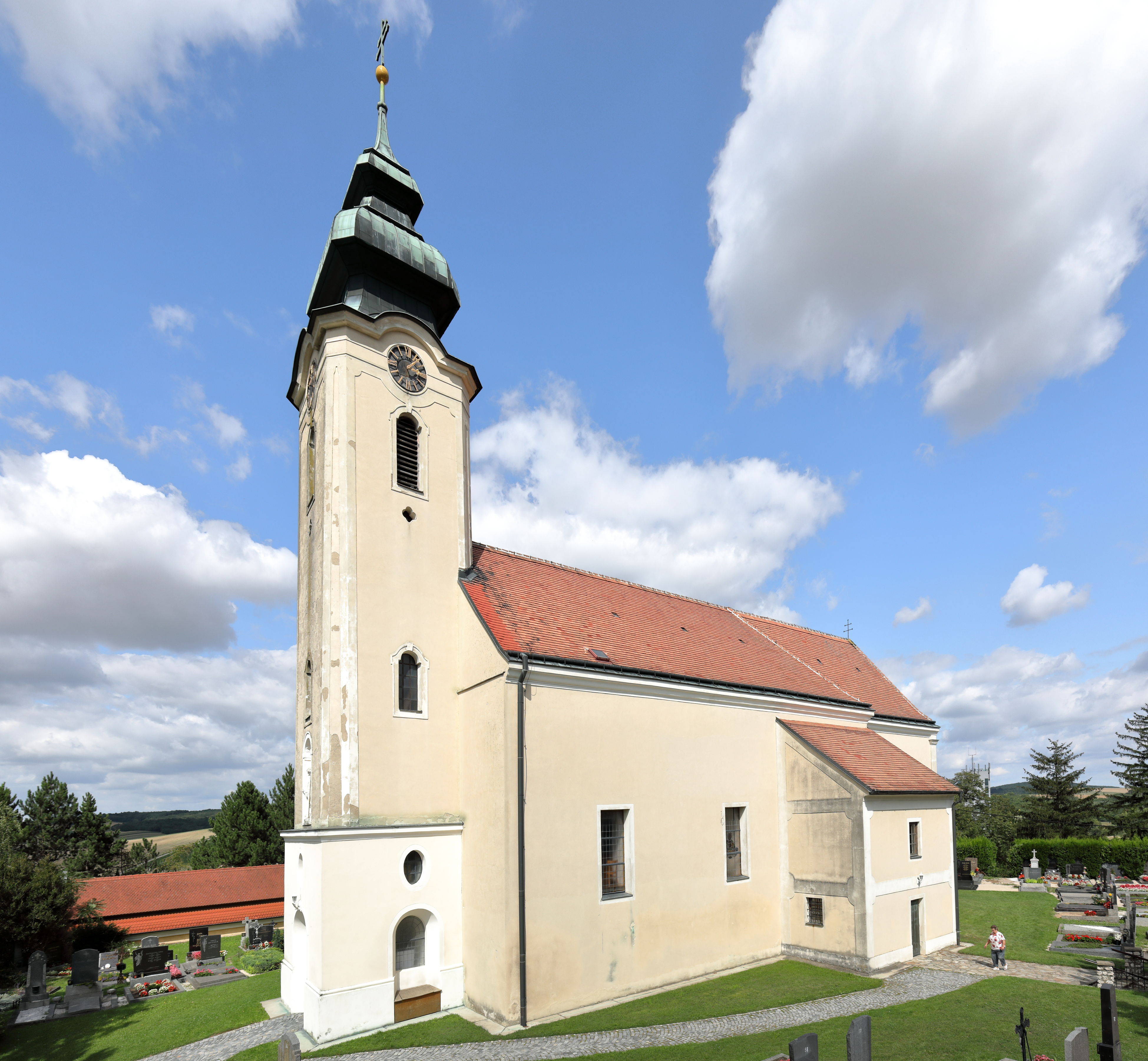 Südwestansicht der röm.-kath. Pfarrkirche hl. Johannes der Täufer in der niederösterreichischen Gemeinde Gnadendorf. Der Chor der Kirche wurde in der 2. Hälfte des 16. Jahrhunderts errichtet, das Langhaus im 4. Viertel des 17. Jahrhunderts und der vorgestellte Westturm ist mit 1743 datiert.